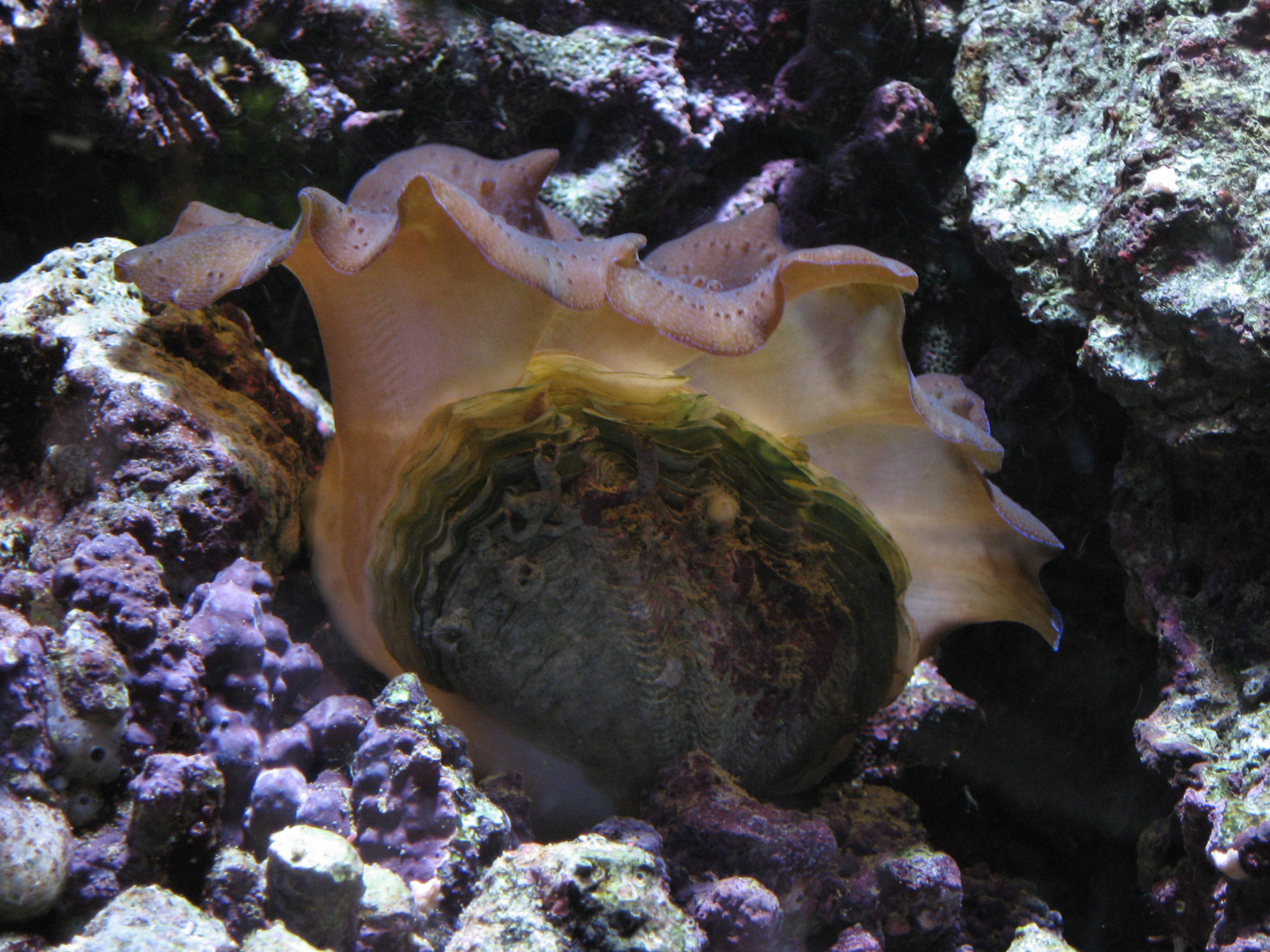 Tridacna crocea in Muséum-aquarium de Nancy Map: 48° 41' 41" N 6° 11' 18" E